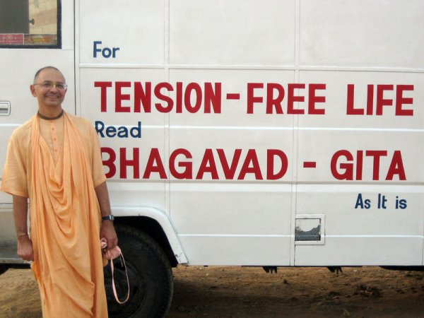 Russian Hare Krishna guru Bhakti Vijnana Goswami